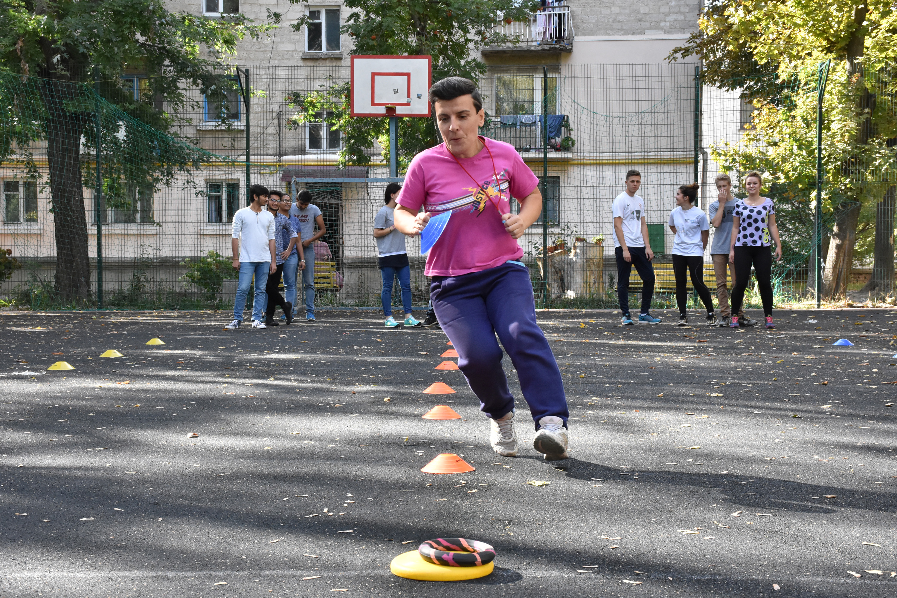 «Веселі старти» для іноземних студентів Тернопільського державного медичного університету імені І. Я. Горбачевського на спортивному майданчику Тернопільського фіздиспансеру на вул. Старий Ринок проводить українська спортсменка, тренерка, громадська діячка Лілія Проць.